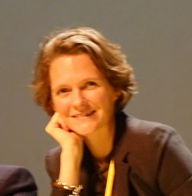 Claire Nouvian aux Tribunes de la Presse à Bordeaux en novembre 2018